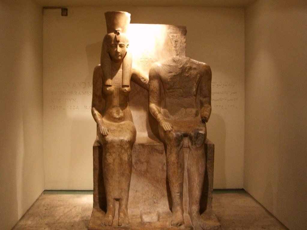 Dyade représentant le dieu Amon et la déesse Mout - Musée de Louxor